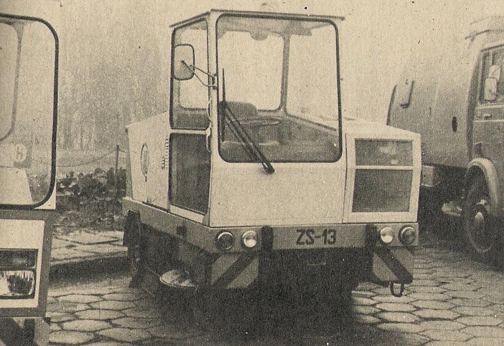 Zamiatarka średnia ZS13 z WUKO Łódź.